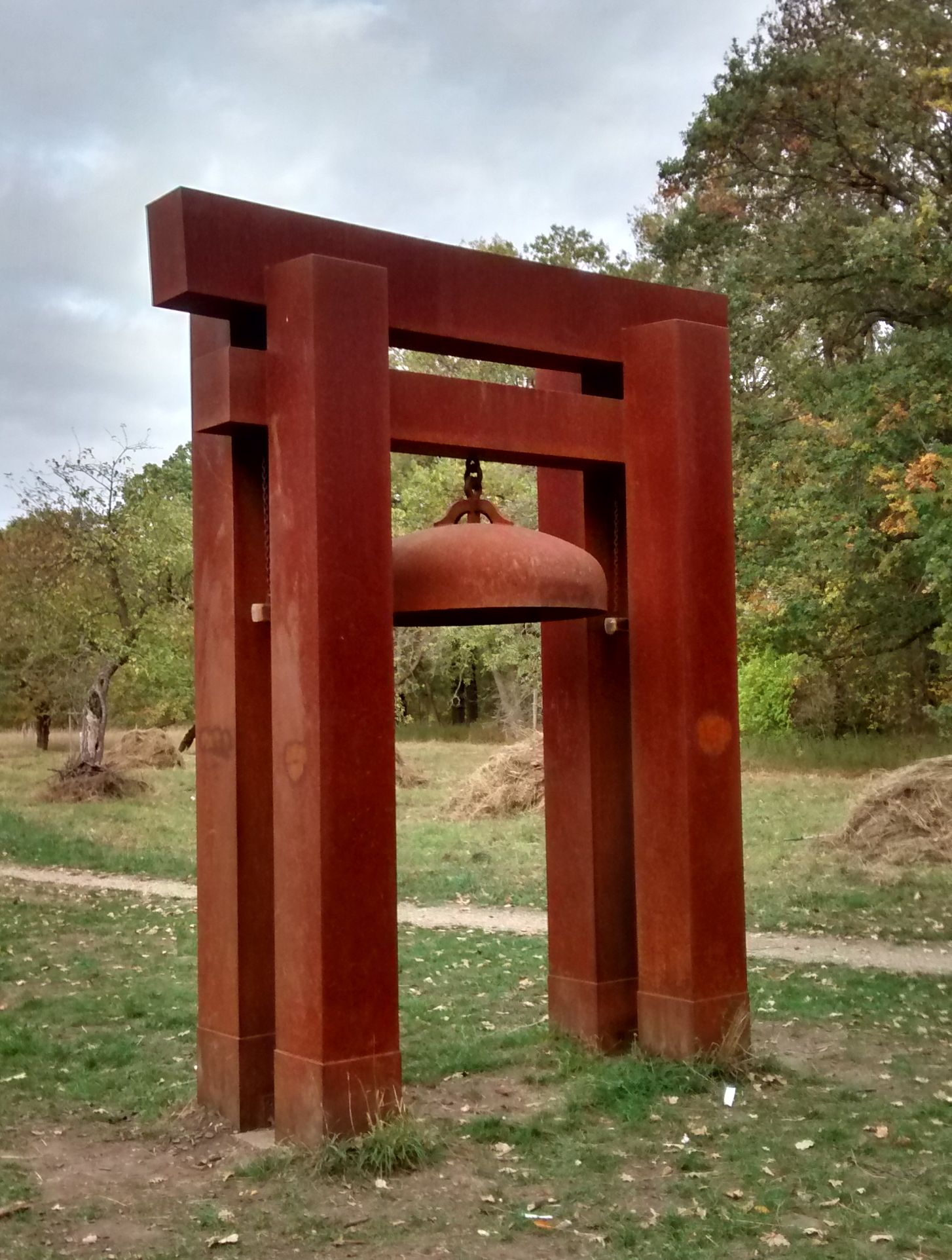 Ostttor mit Glocke von Jörg Bochow im Schlosspark Dieskau